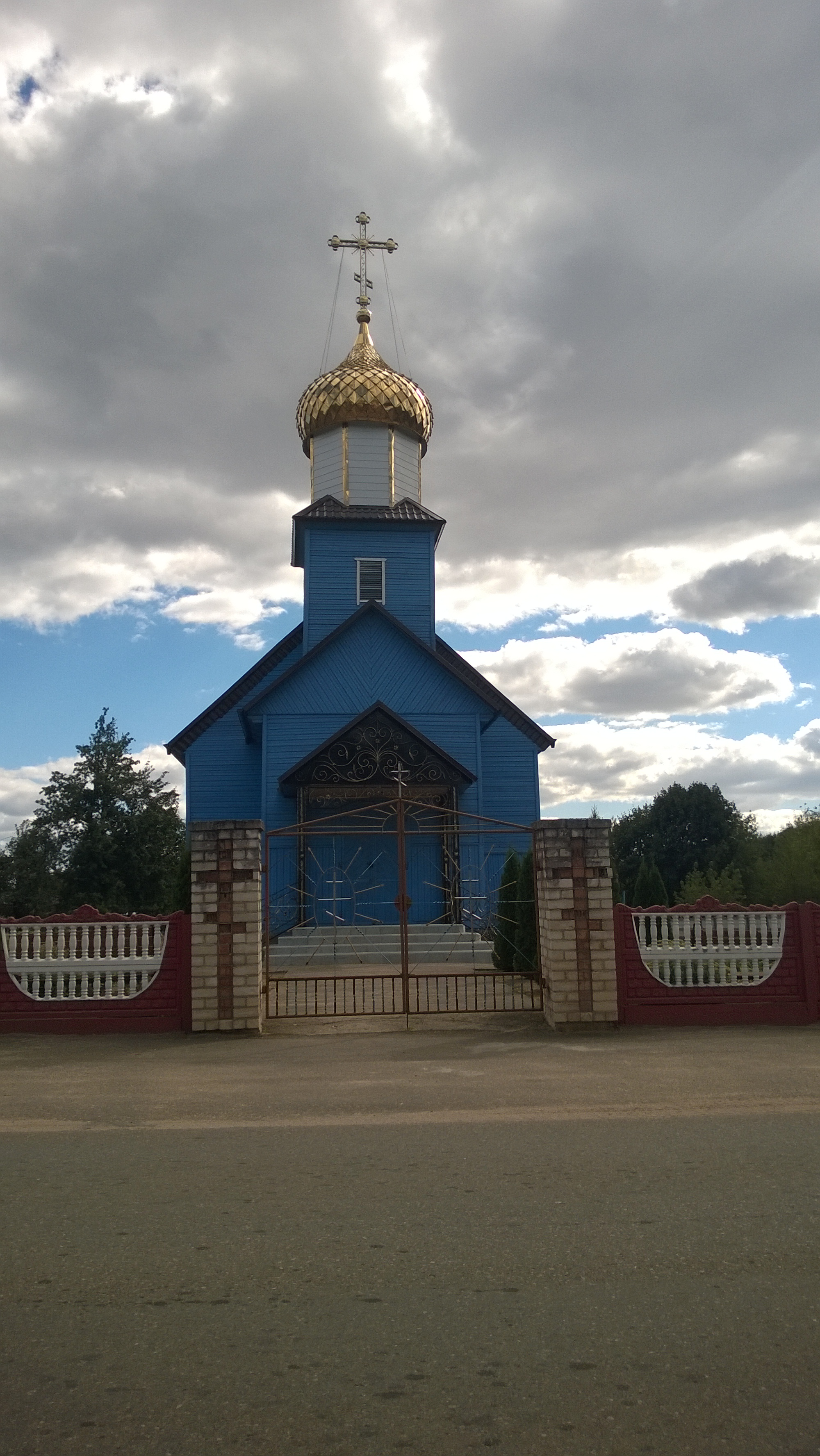 Dembrava, Belarus